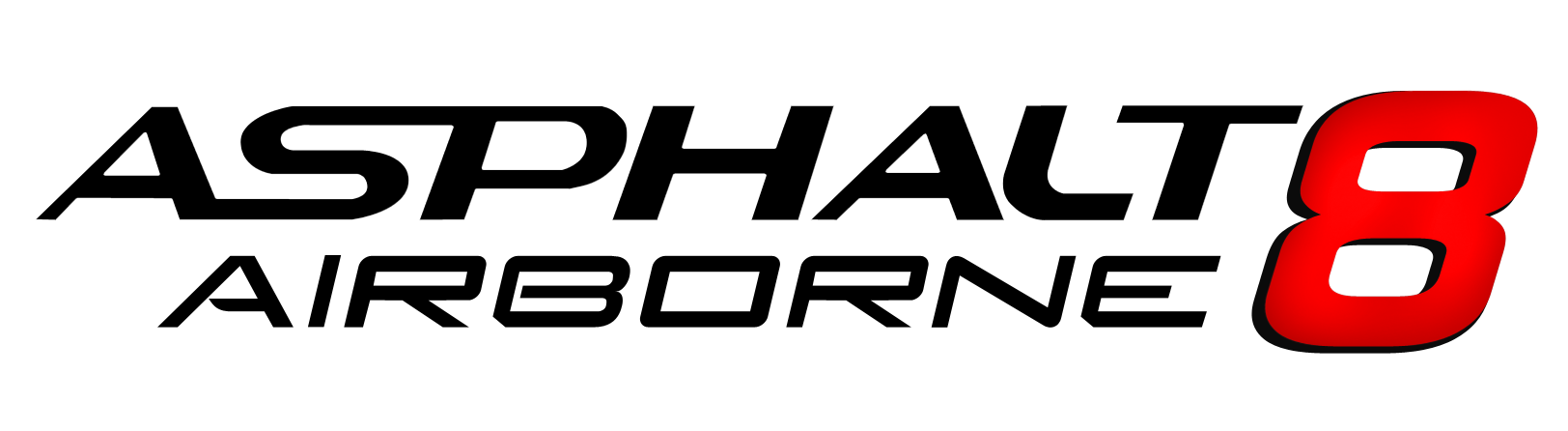 Asphalt 8: Airborne logó